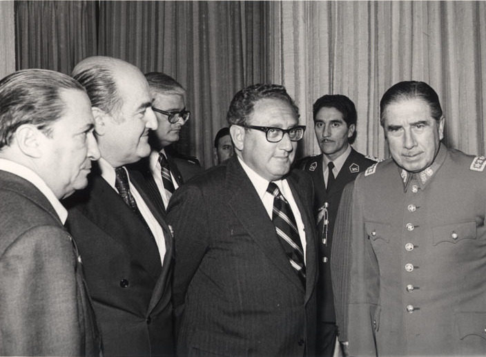 Entrevista Kissinger-Pinochet.